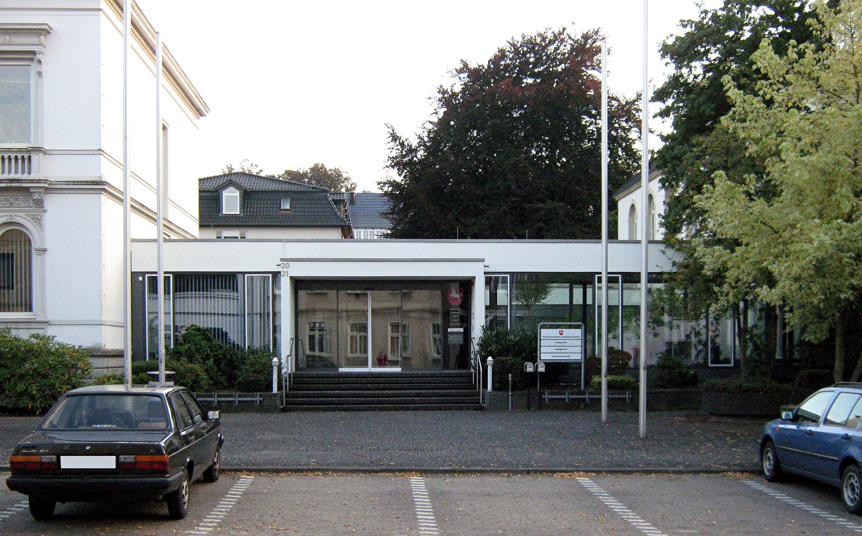 Der Niedersächsische Staatsgerichtshof ist das 1951 gegründete Landesverfassungsgericht des Landes Niedersachsen in Bückeburg